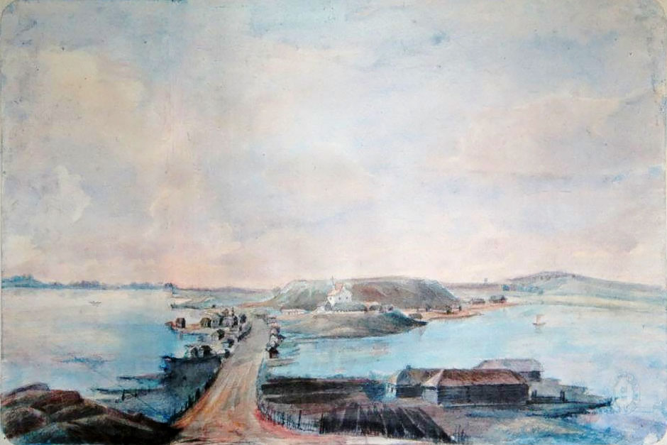 Беларуская (тарашкевіца): Браслаў (Brasłaŭ), вуліца Вялікая (vulica Vialikaja)